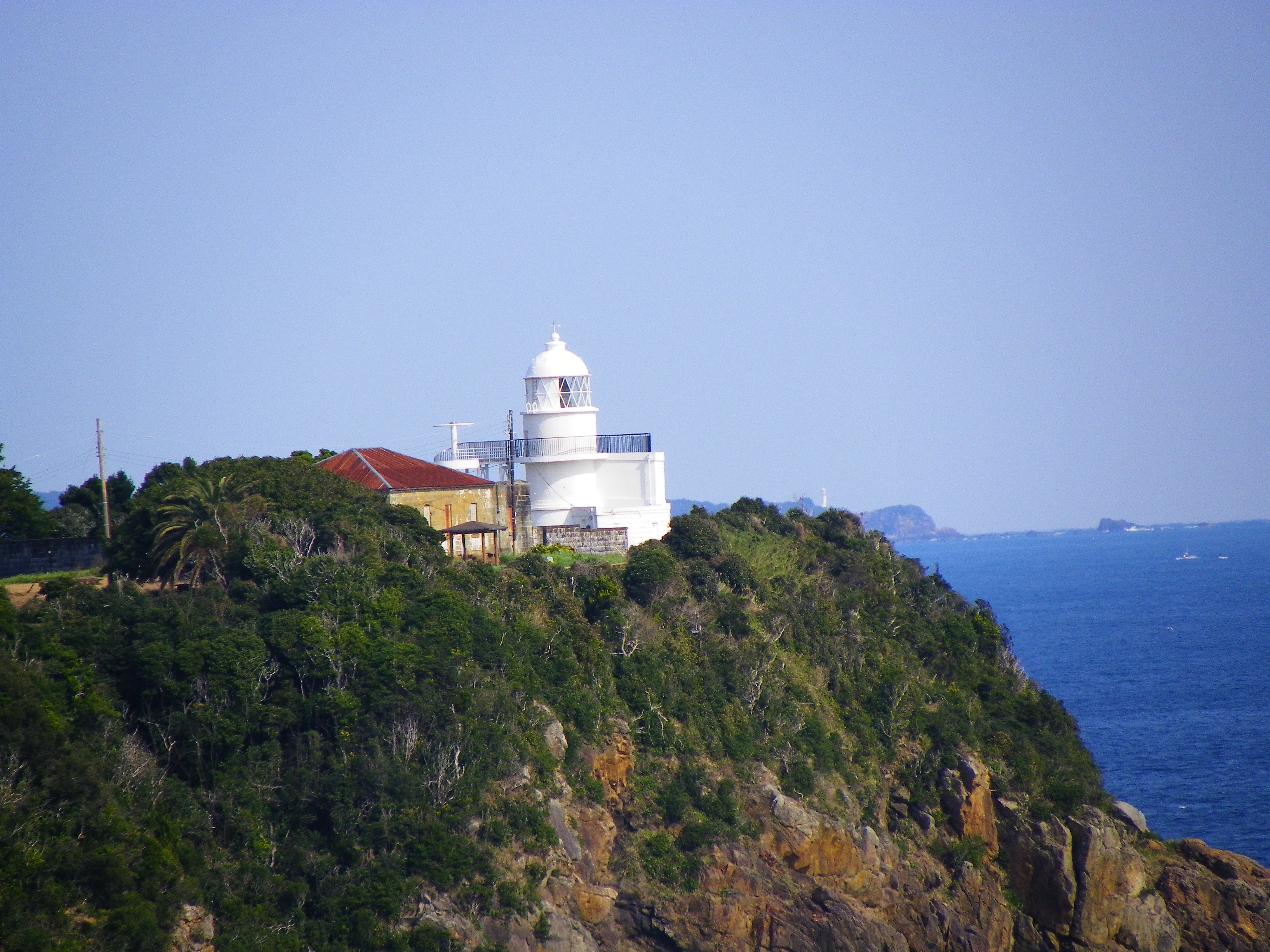 海金剛から望む樫野埼灯台。